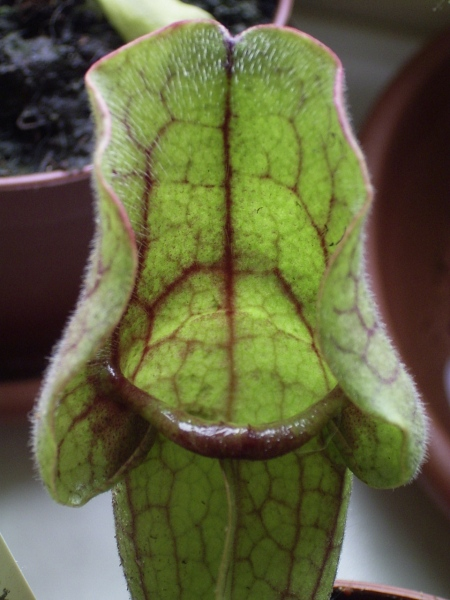 Sarracenia purpurea detail